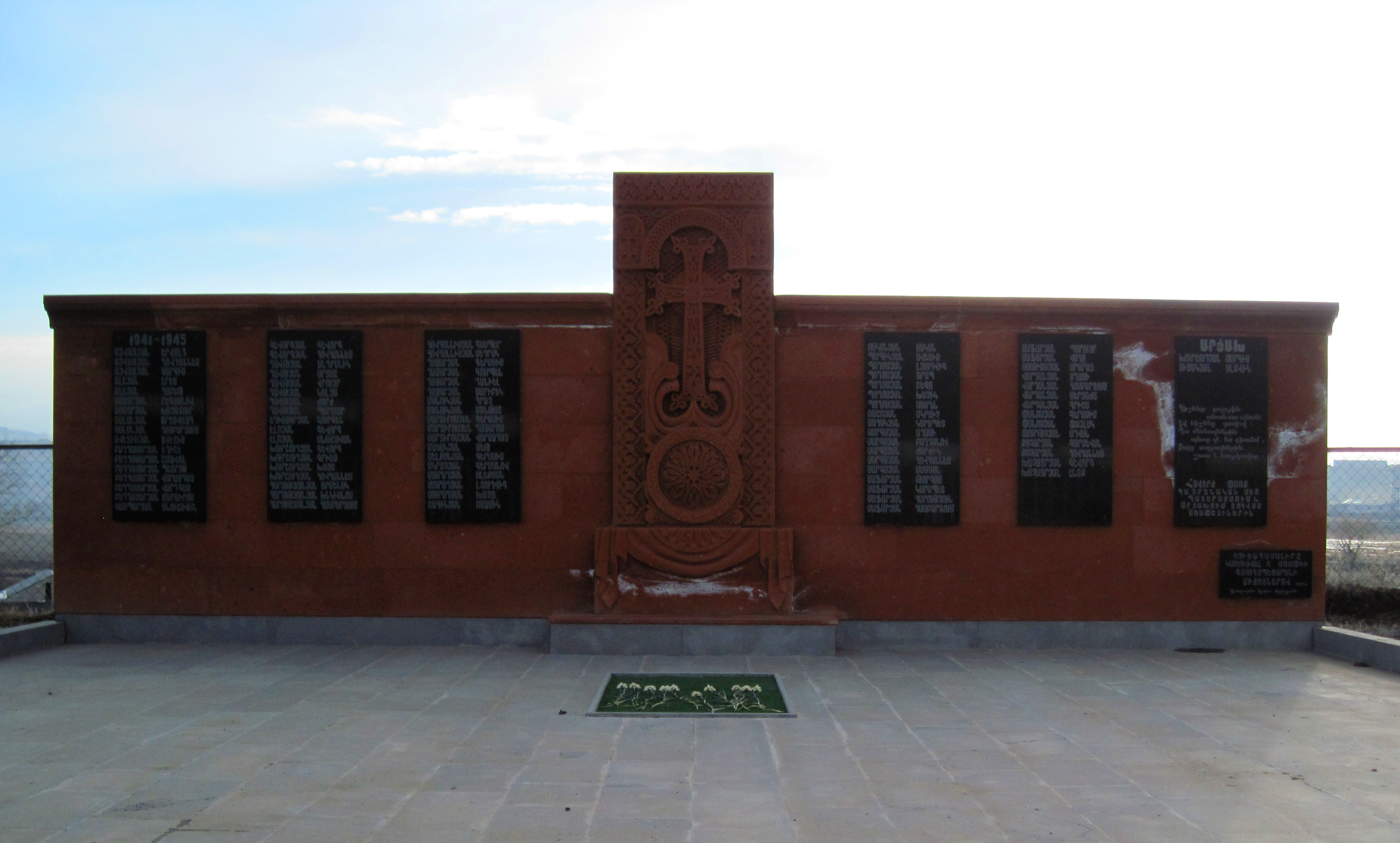 Հայրենական մեծ պատերազմի զոհերի հիշատակին նվիրված հուշակոթող